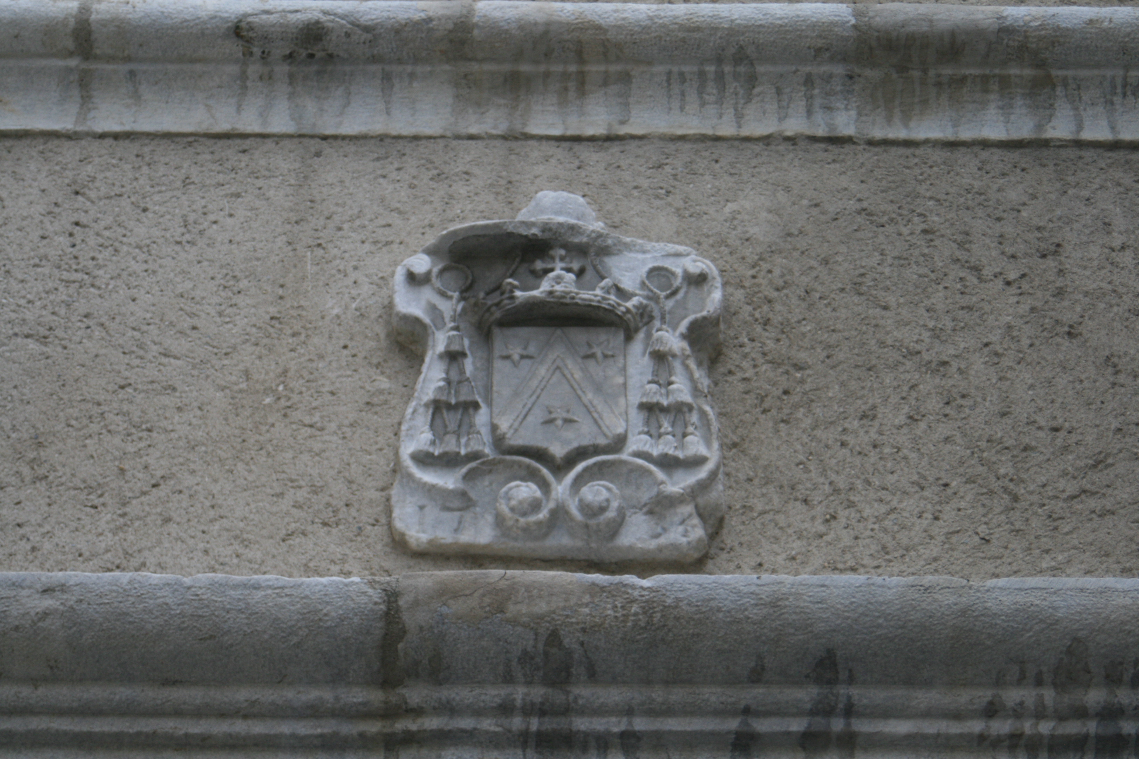 Blason de la maison de Milliet situé sur le fronton du palais épiscopal de Moûtiers (Tarentaise)